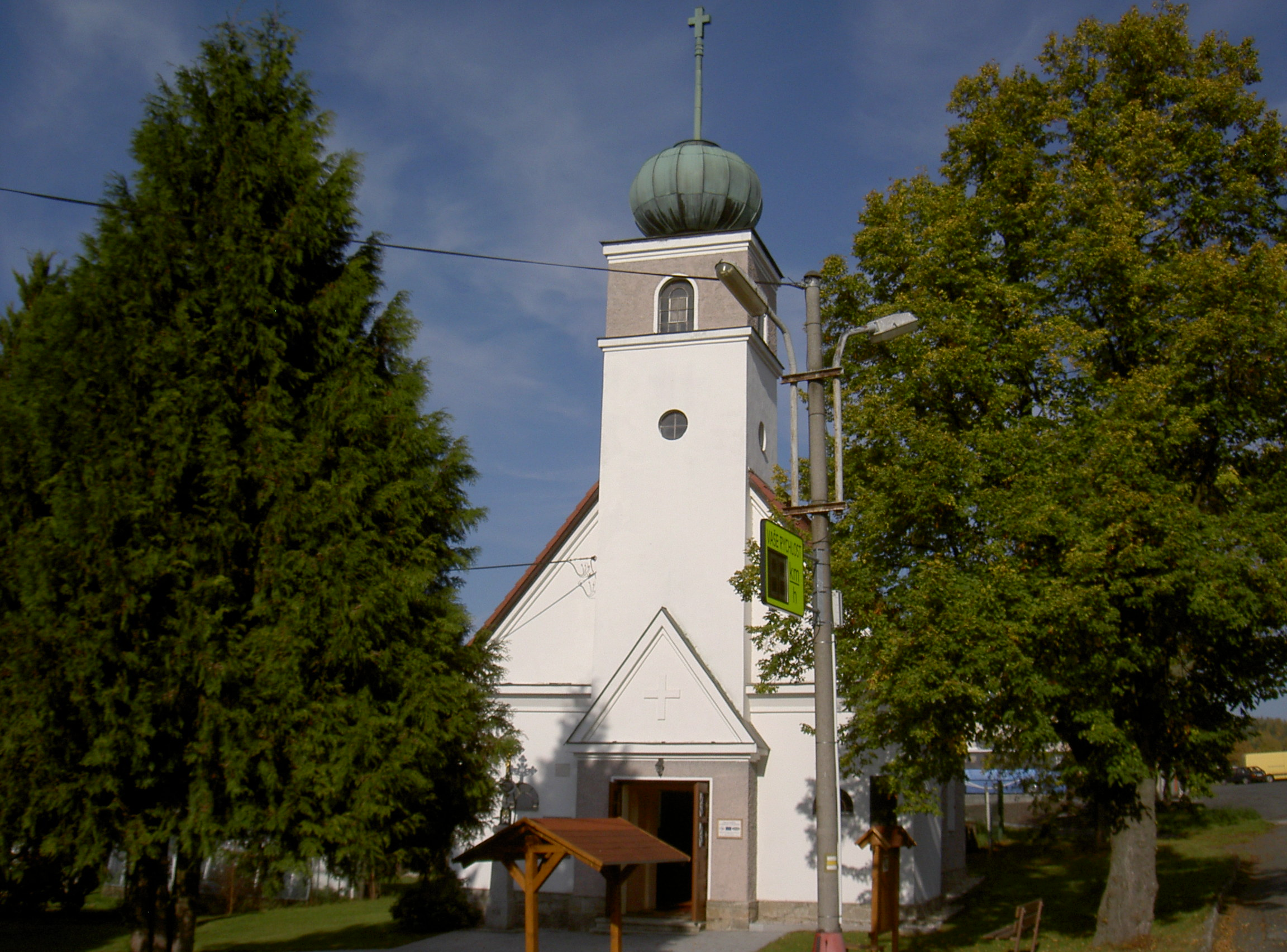 Luženičky Kapelle St. Anton